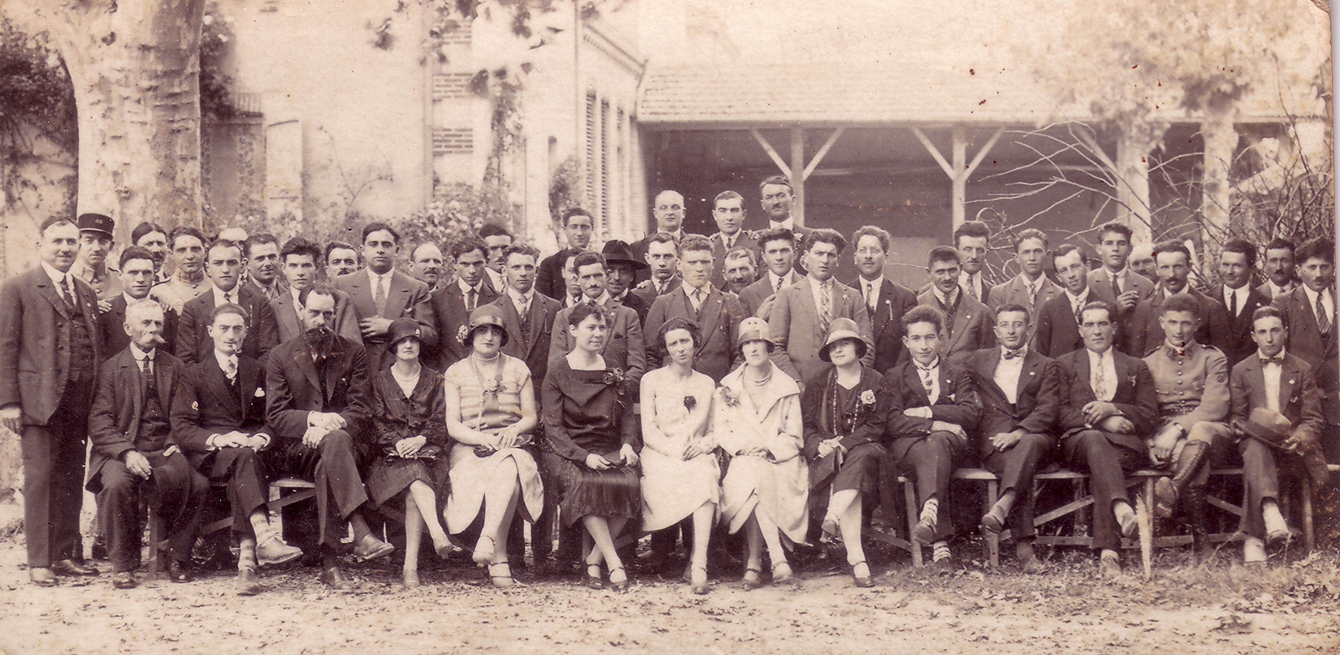 Banquet à Saint-Laurent (Haute-Garonne), organisé par l'Avant-Garde de la Save